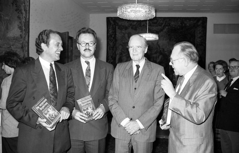 Bonn, 6.11.1991 Anläßlich der Präsentation des im Bouvier Verlag erschienen Buches "Die vergessene Regierung - Die große Koalition 1966 bis 1969 und ihre langfristigen Wirkungen" der Autoren Dr. Reinhard Schmoeckel und Herrn Kaiser durch den Bonner Verleger Thomas Grundmann im Palais Schaumburg hielt Bundespräsident a.D., Prof. Dr. Carl Carstens, die Laudatio.